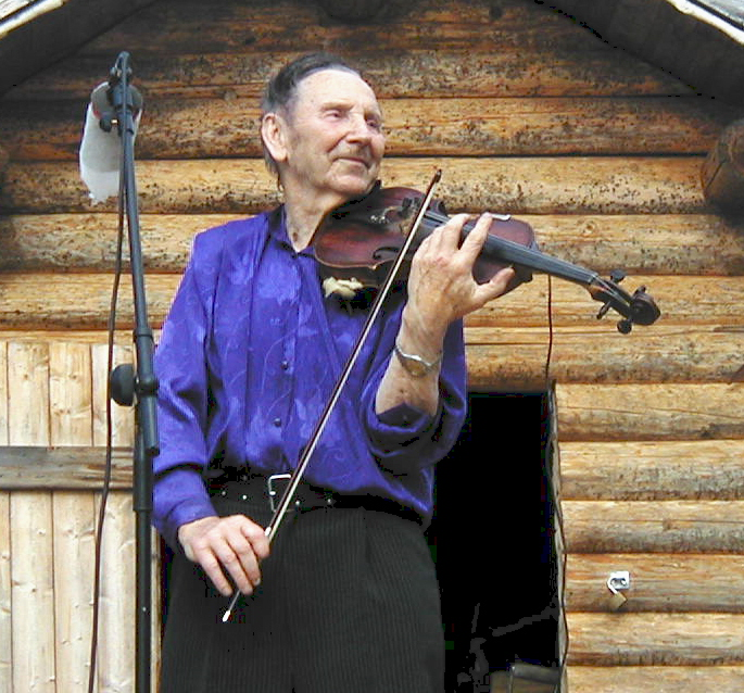 Wille Toors Ransbysätern 2005